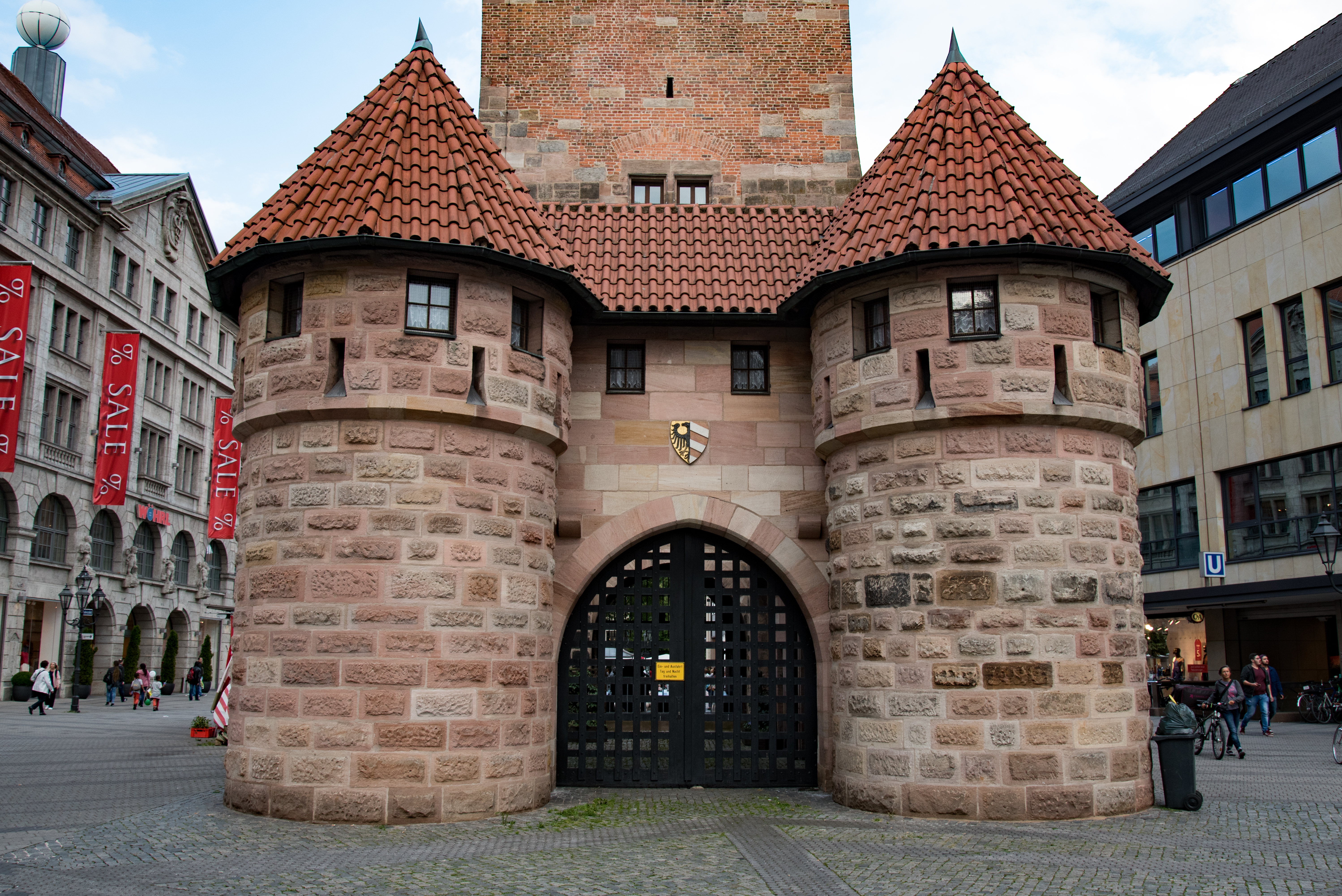 Nürnberg, Stadtbefestigung, Weißer Turm